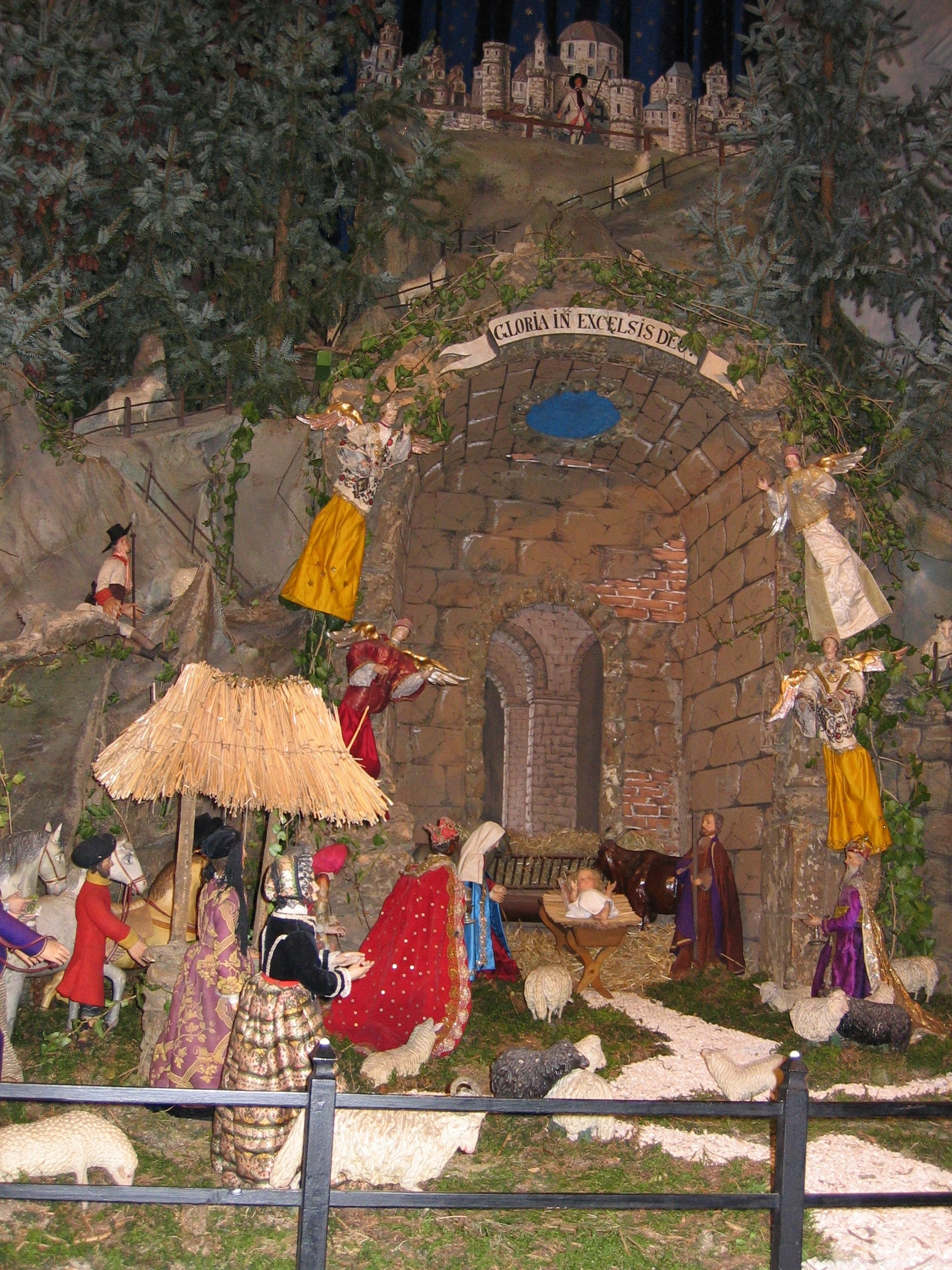 Hedinger Kirche in Sigmaringen Kloster Hedingen